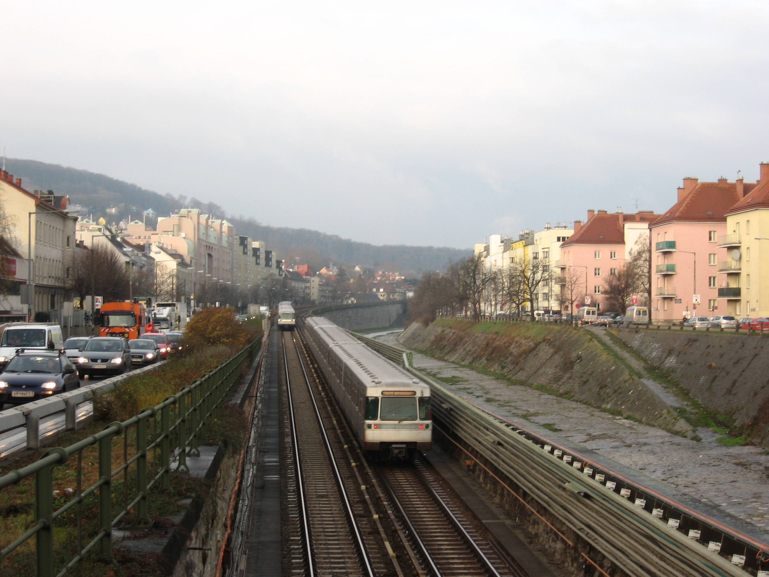 Wien: Westausfahrt B1 im 13. und 14. Bezirk; Vienna (Austria), Highway B1 in Western City